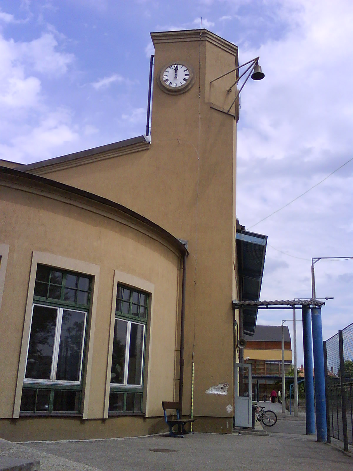 Gregor József Általános Iskola tornacsarnoka (Budapest)